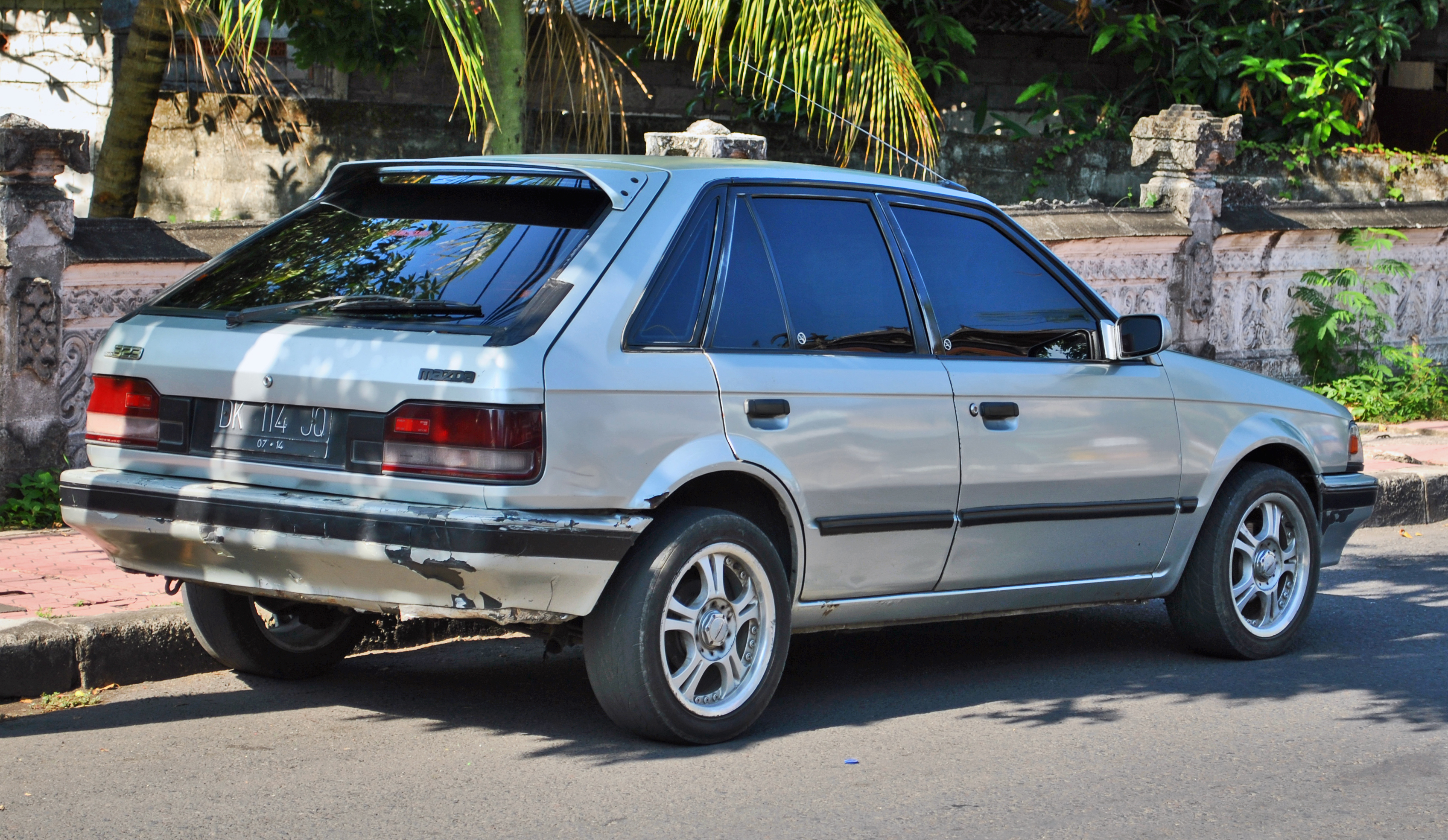 Sisi kanan belakang Mazda 323 hatchback di Denpasar, Bali.